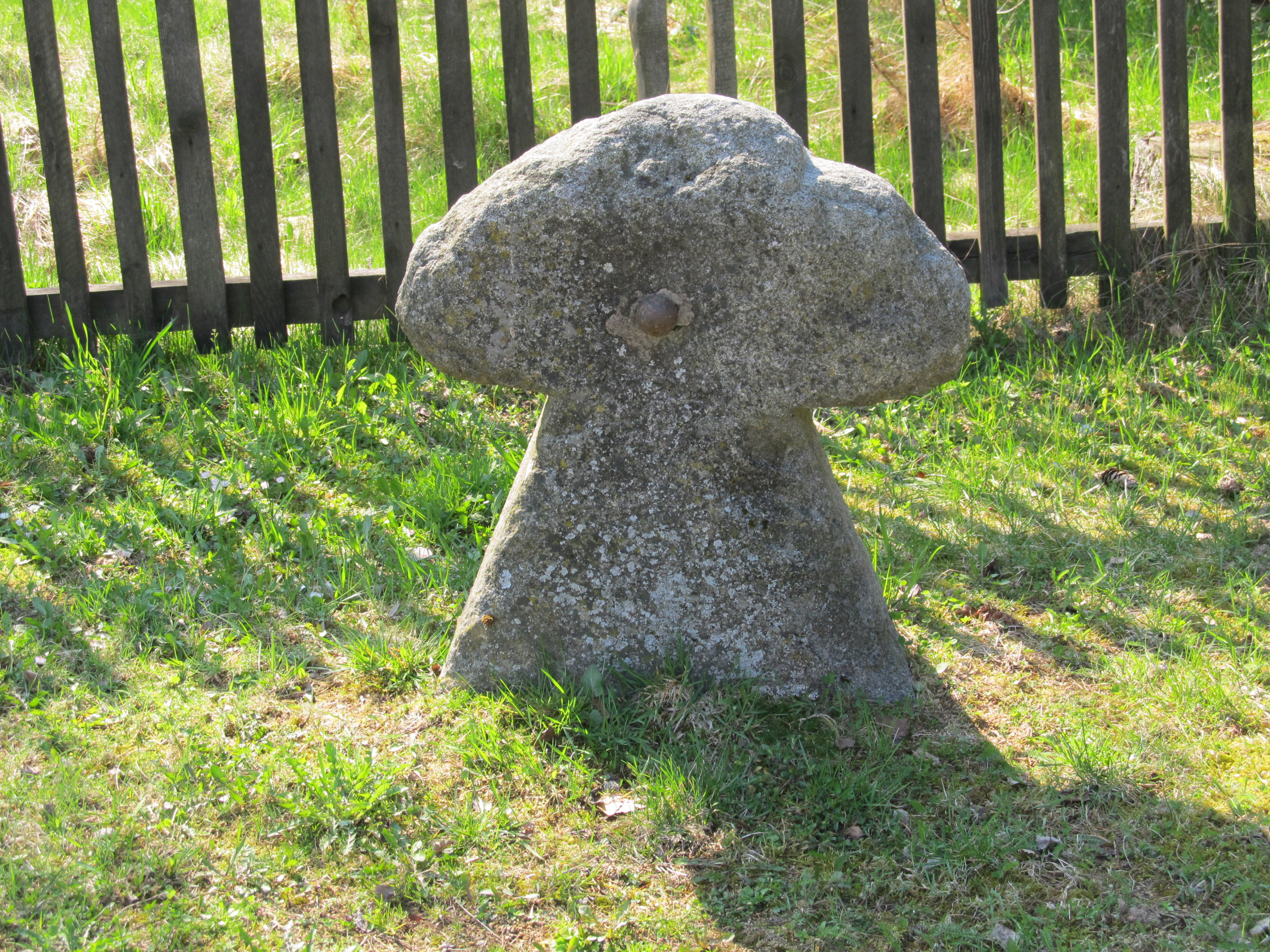 Chanovice - smírčí kříž č 0260 u skanzenu